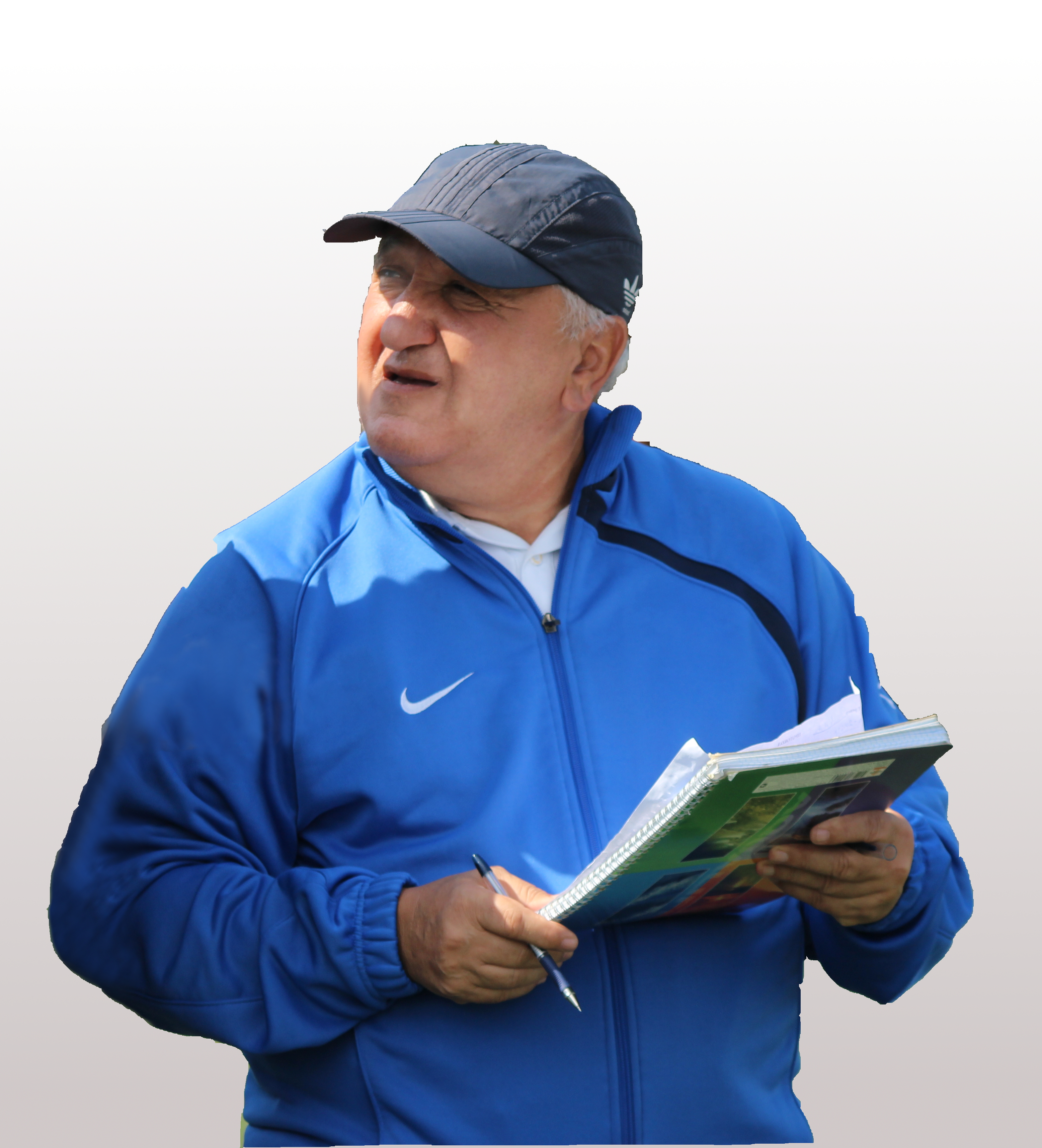 Рафик Балбабян на тестировании группы ФЦ ФК "Тобол"